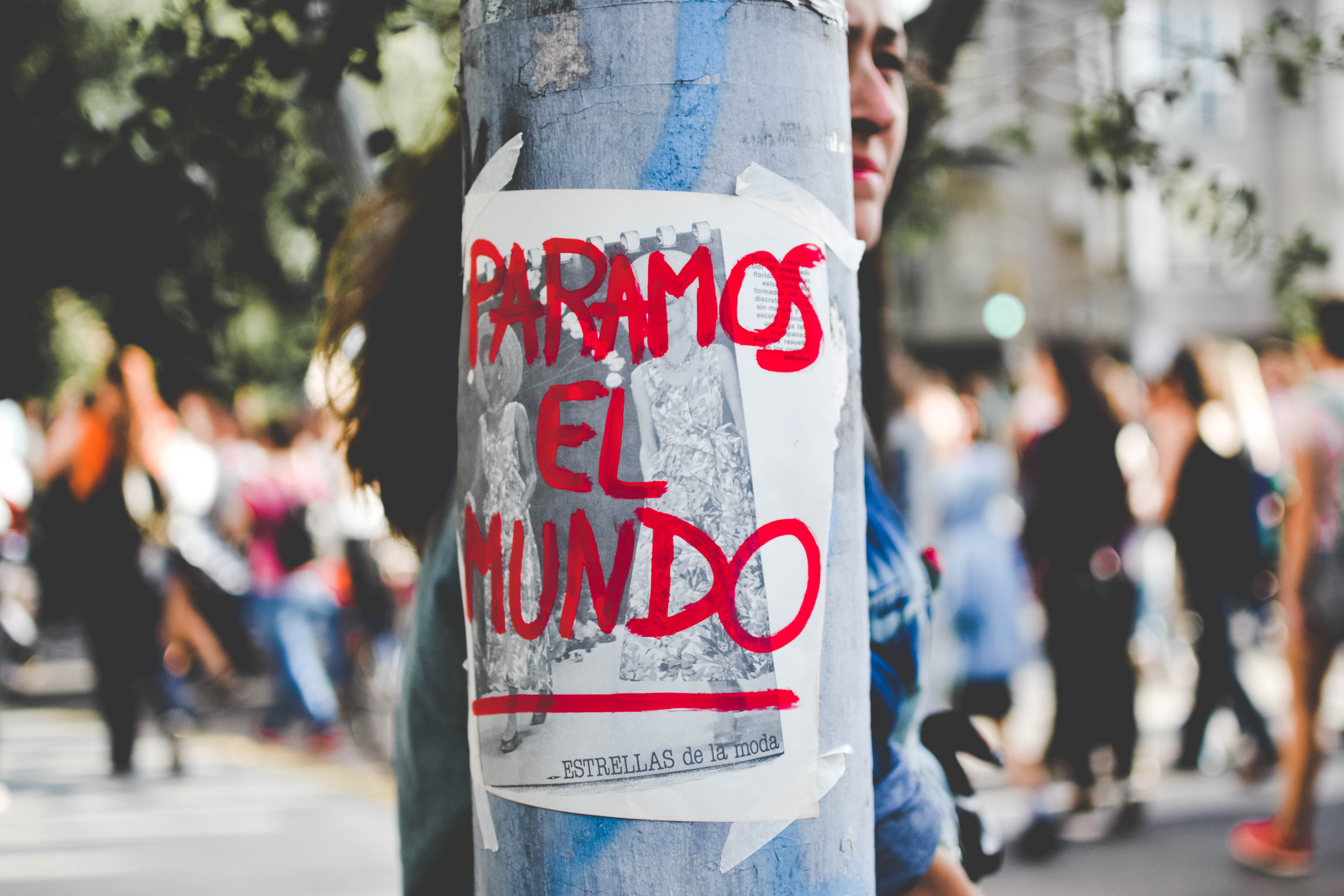 Tercer paro internacional de mujeres Santa Fe Argentina